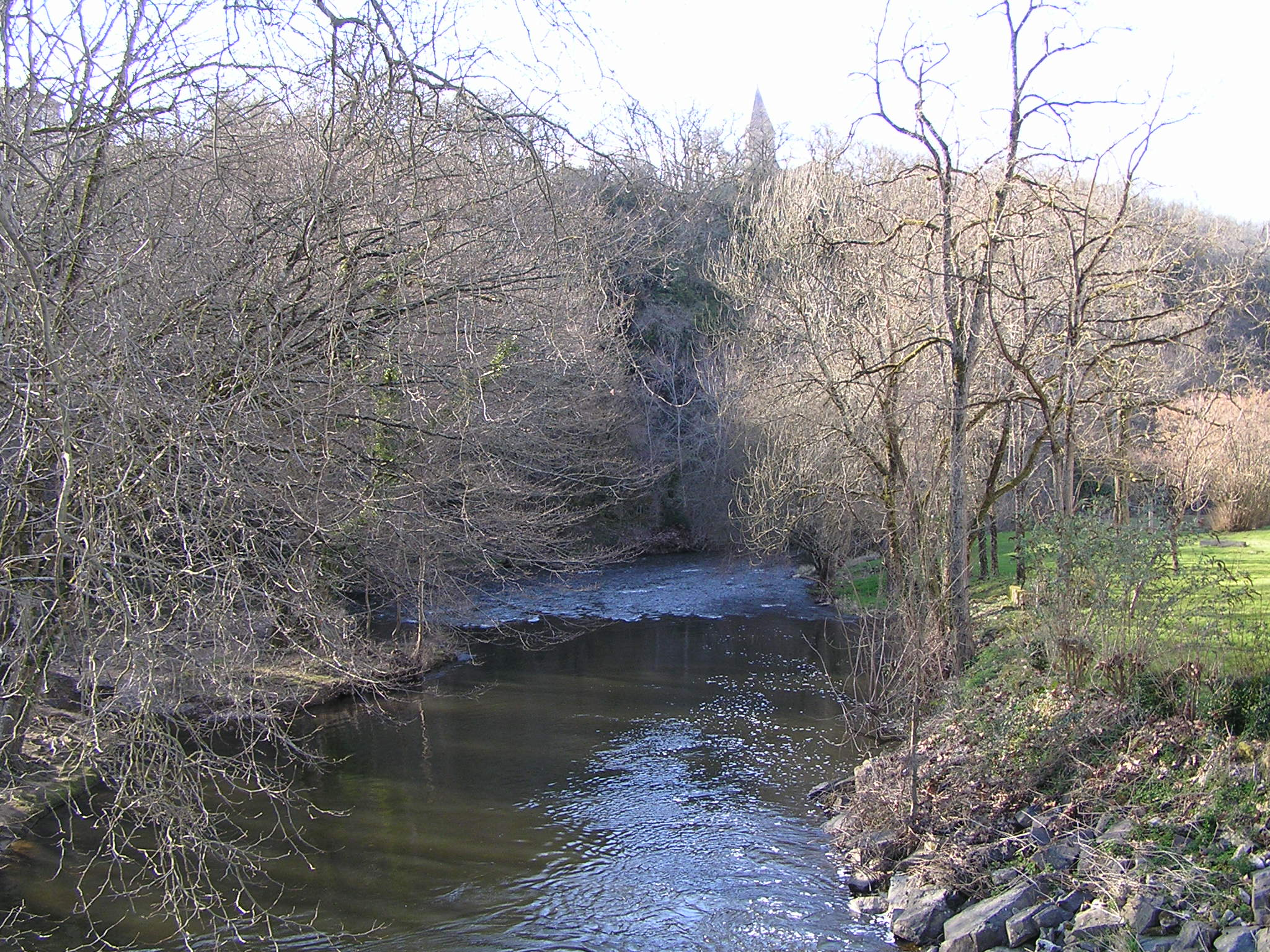 la Tardoire à Rancogne